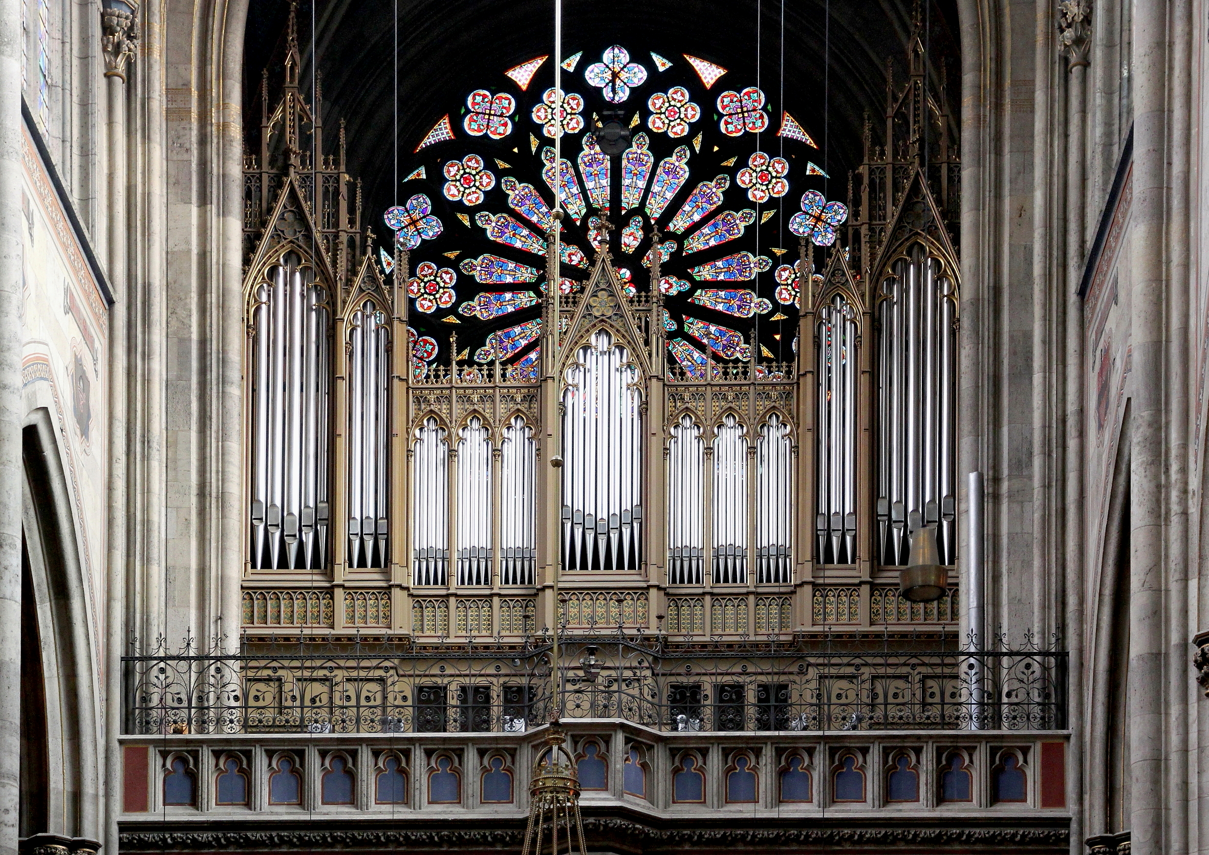 Die Hauptorgel der Wiener Votivkirche; 1878 von der Firma E. F. Walcker & Cie gebaut. Die Orgel mit insgesamt 3762 Pfeifen hat 61 Register, 3 Manuale und Pedal.